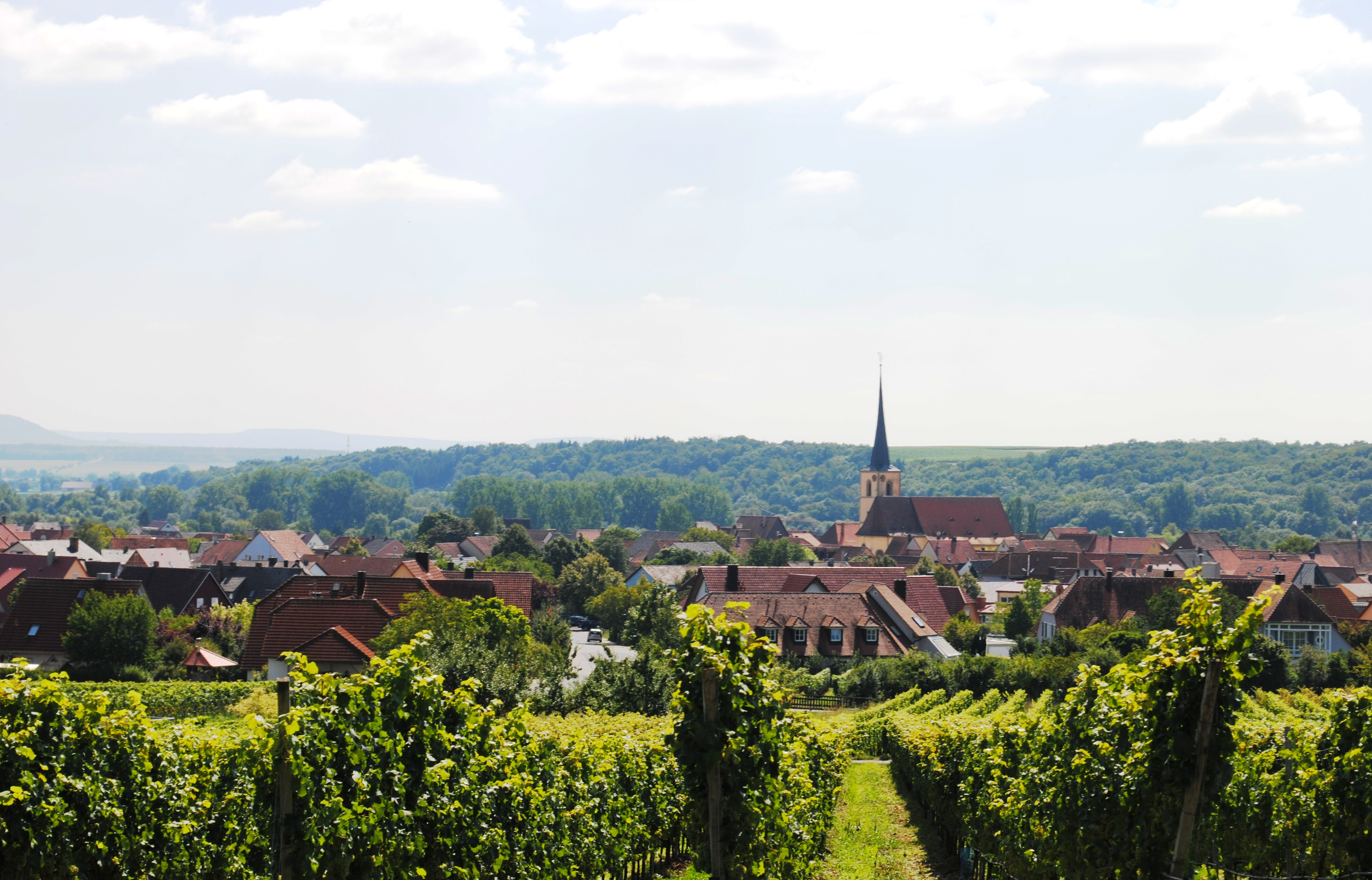 Panorama, Kreuzberg, SommerachThis is a photograph of an architectural monument.